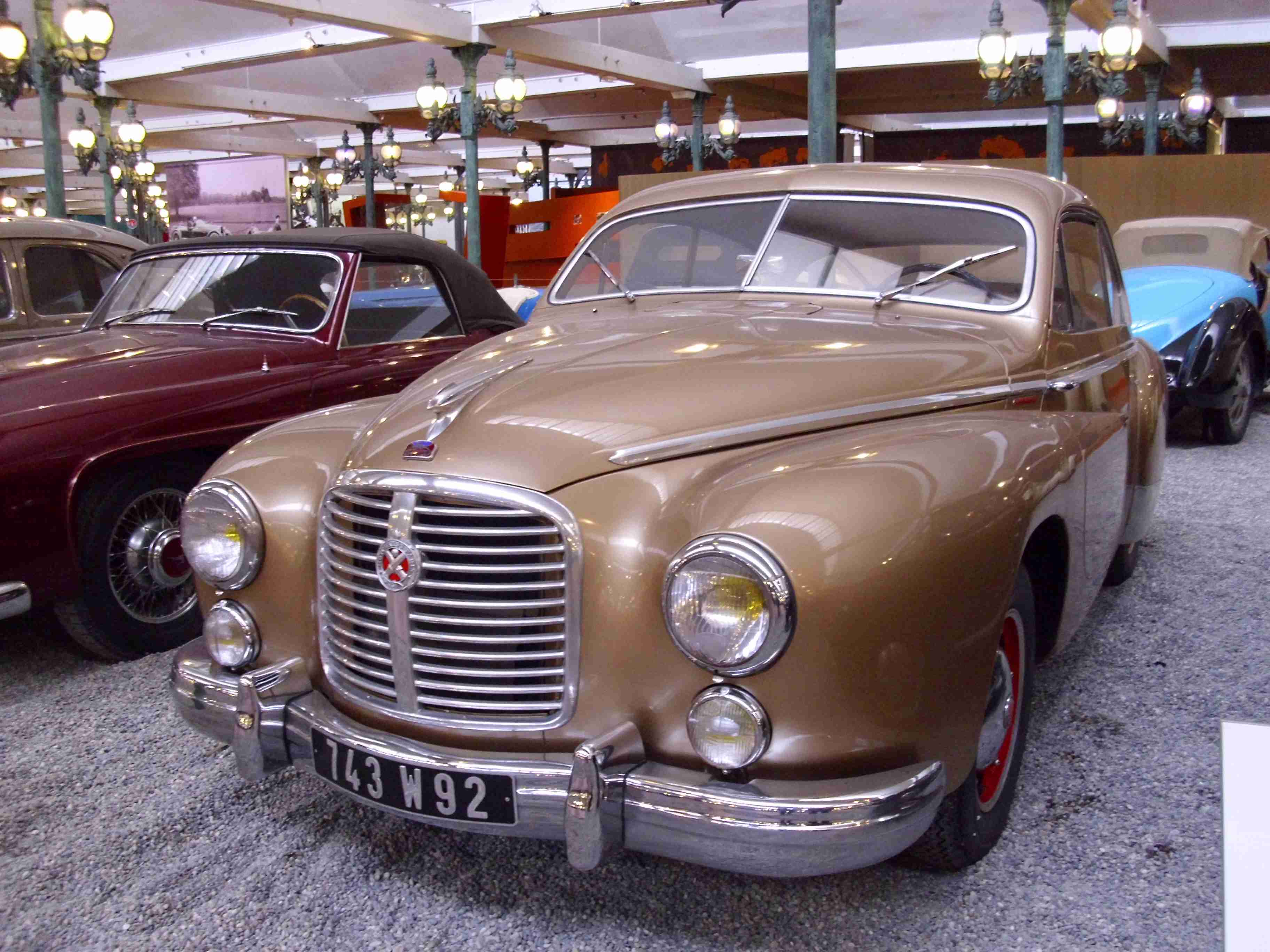 Hotchkiss-Grégoire 1951-1953